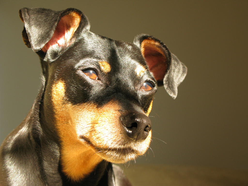 a Miniature Pinscher